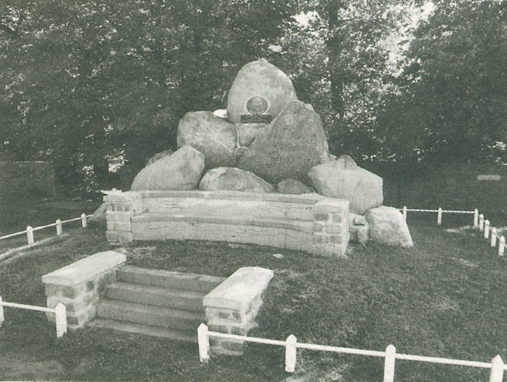 Denkmal über Gotthilf Hagen (1797 - 1884), Wasserbaudirektor Königsberg und Berlin, Urheber des Hagen-Poiseuille´schen Gesetzes. Das Denkmal ist erhalten in Pillau, dem heutigen russischen Baltijsk